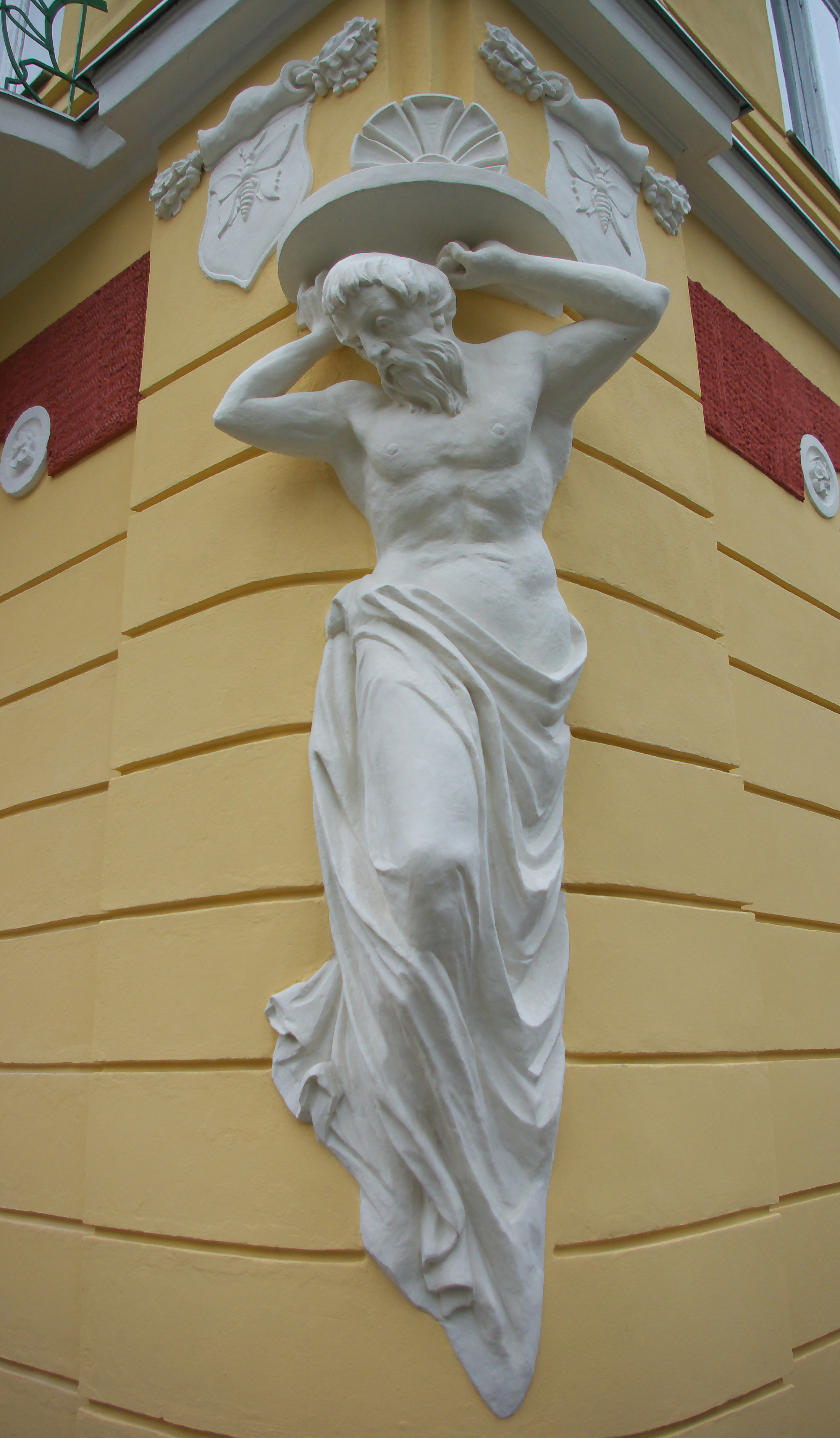 Kamienica przy ul. Kazimierza Wielkiego 6 w Sanoku. Rzeźba Atlasa